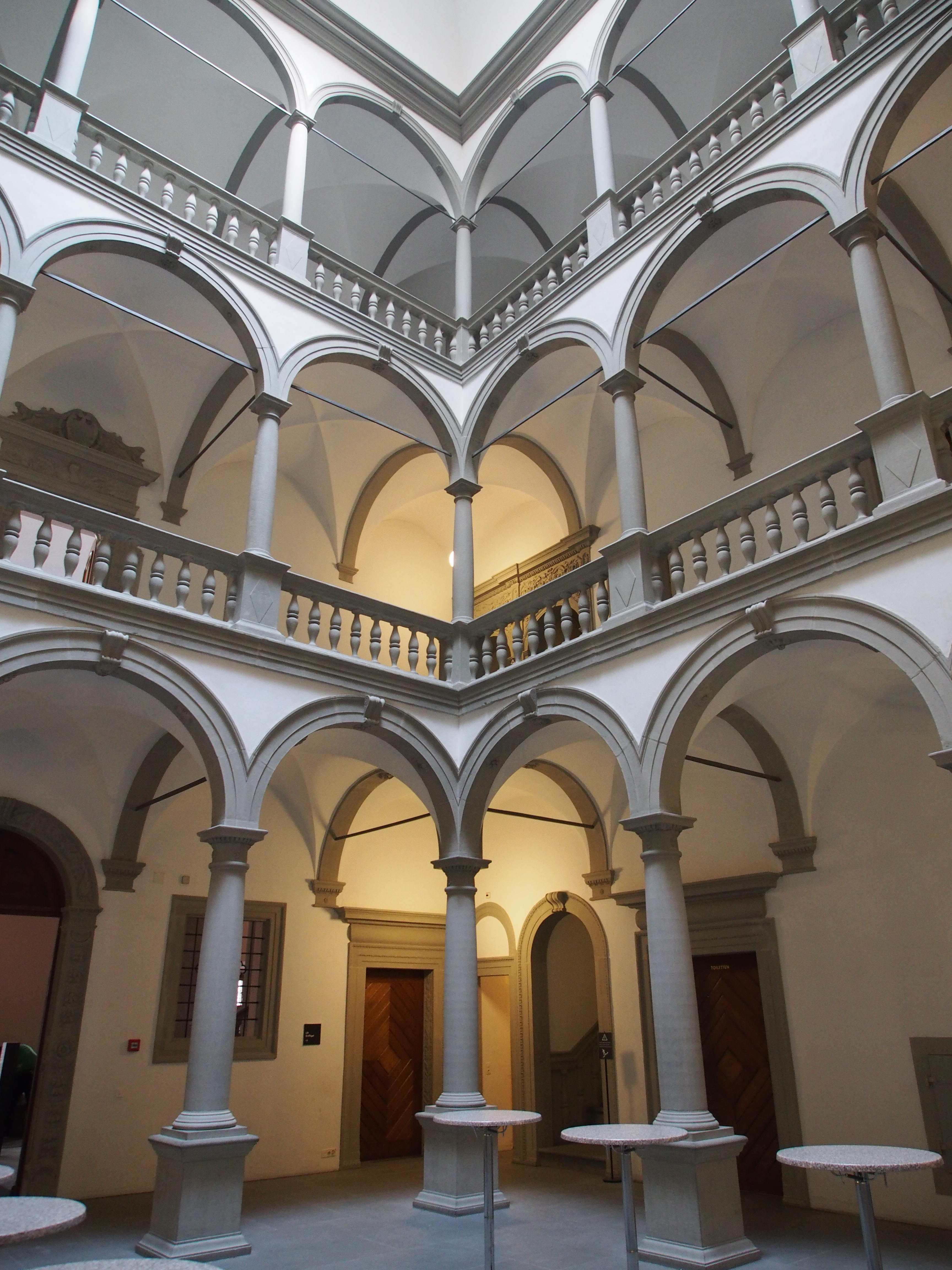 Ehemaliger Ritter'scher Palast (Regierungsgebäude Bahnhofstrasse 15